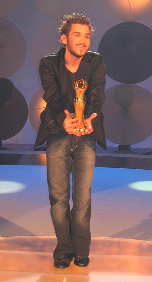 Anžej Dežan, studio 1 TV Slovenije, 2006 izdelal: Ziga 23:11, 30 marec 2006 (CEST)